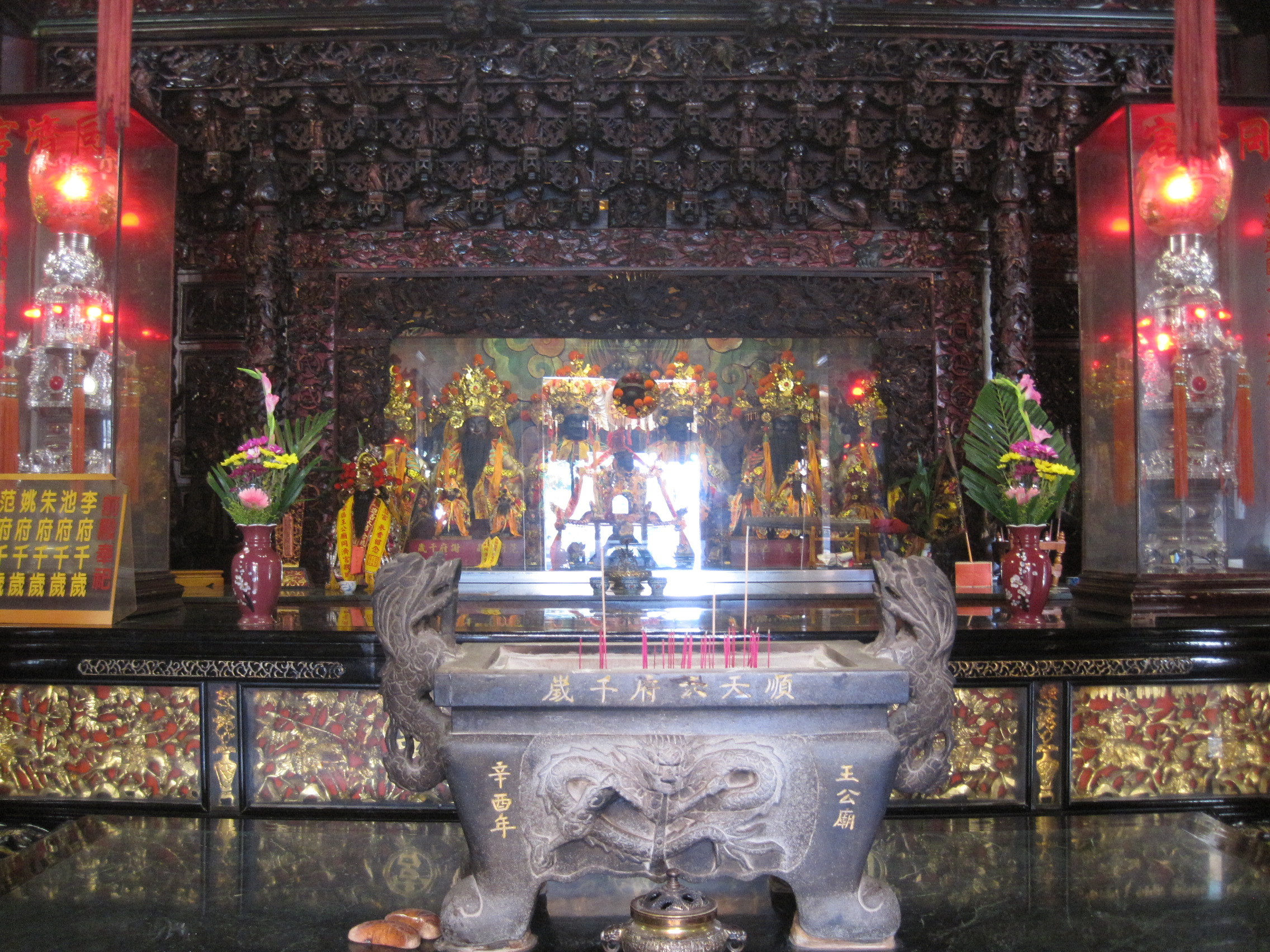 中文（台灣）: 新營同濟宮前殿神龕